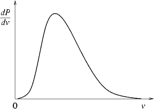 Zvezna porazdelitev.